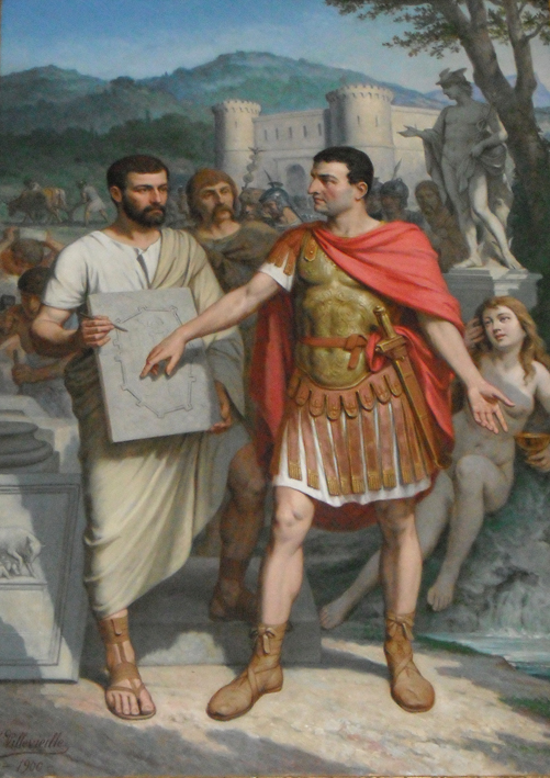 Sextius Calvinus fondant la ville d'Aix. Par Joseph Villevieille (1829-1916)